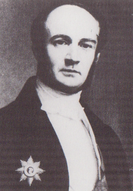 zeitgenössischer Stich des hessischen Staatsministers Reinhard von Dalwigk